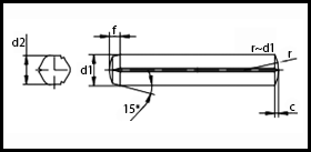 ISO 8740